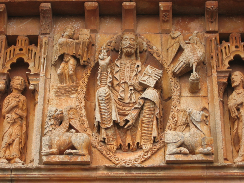 Detalle del Pórtico de San Juan Bautista en Moarves de Ojeda (Palencia)